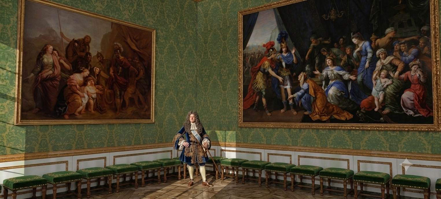 Antichambre du château de Meudon au temps de Louvois, avec les tableaux de Coriolan de Charles de La Fosse et de Pierre Mignard, Les reines de Perse aux pieds d'Alexandre.